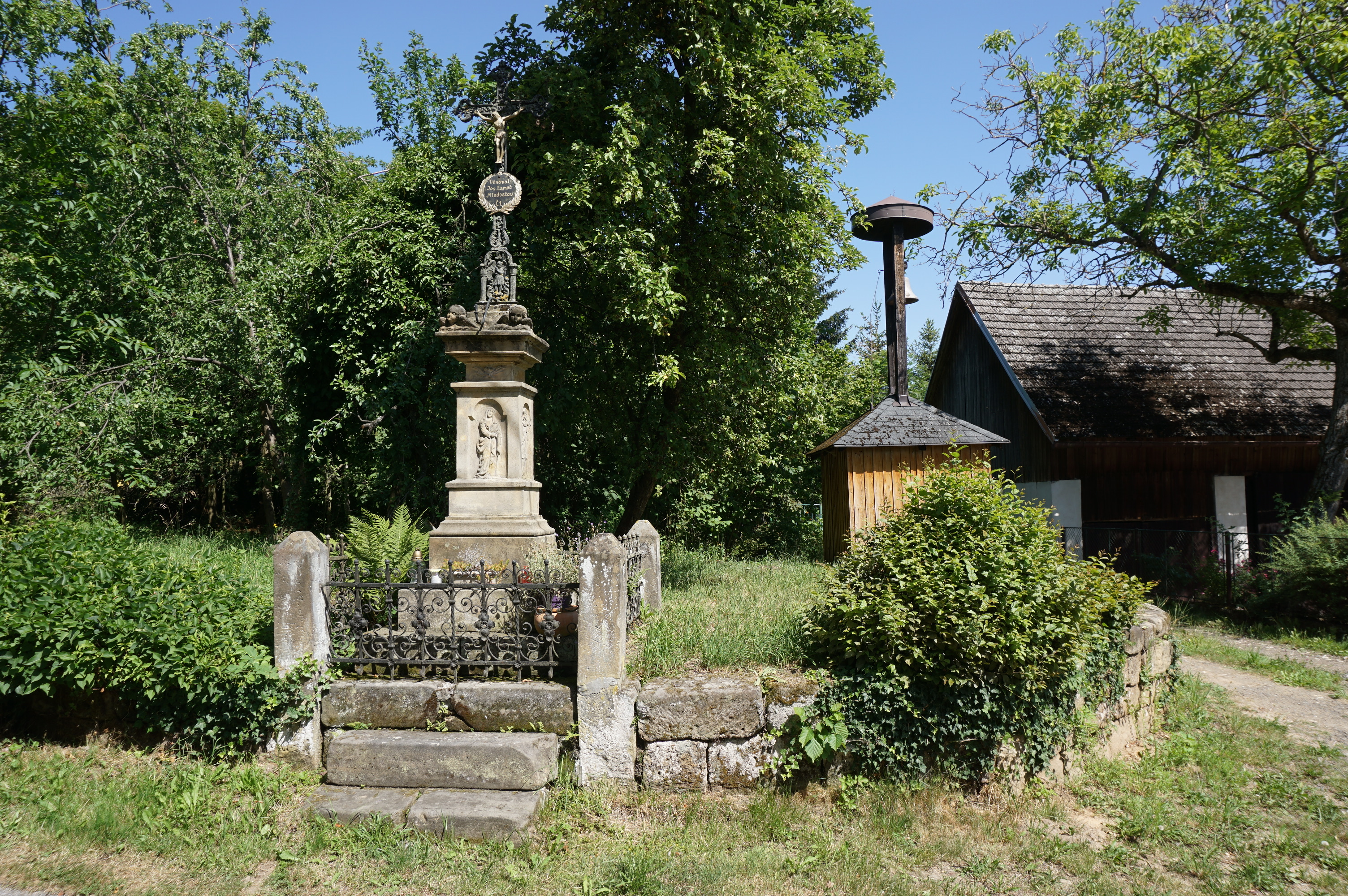 Krucifix, Mladostov.